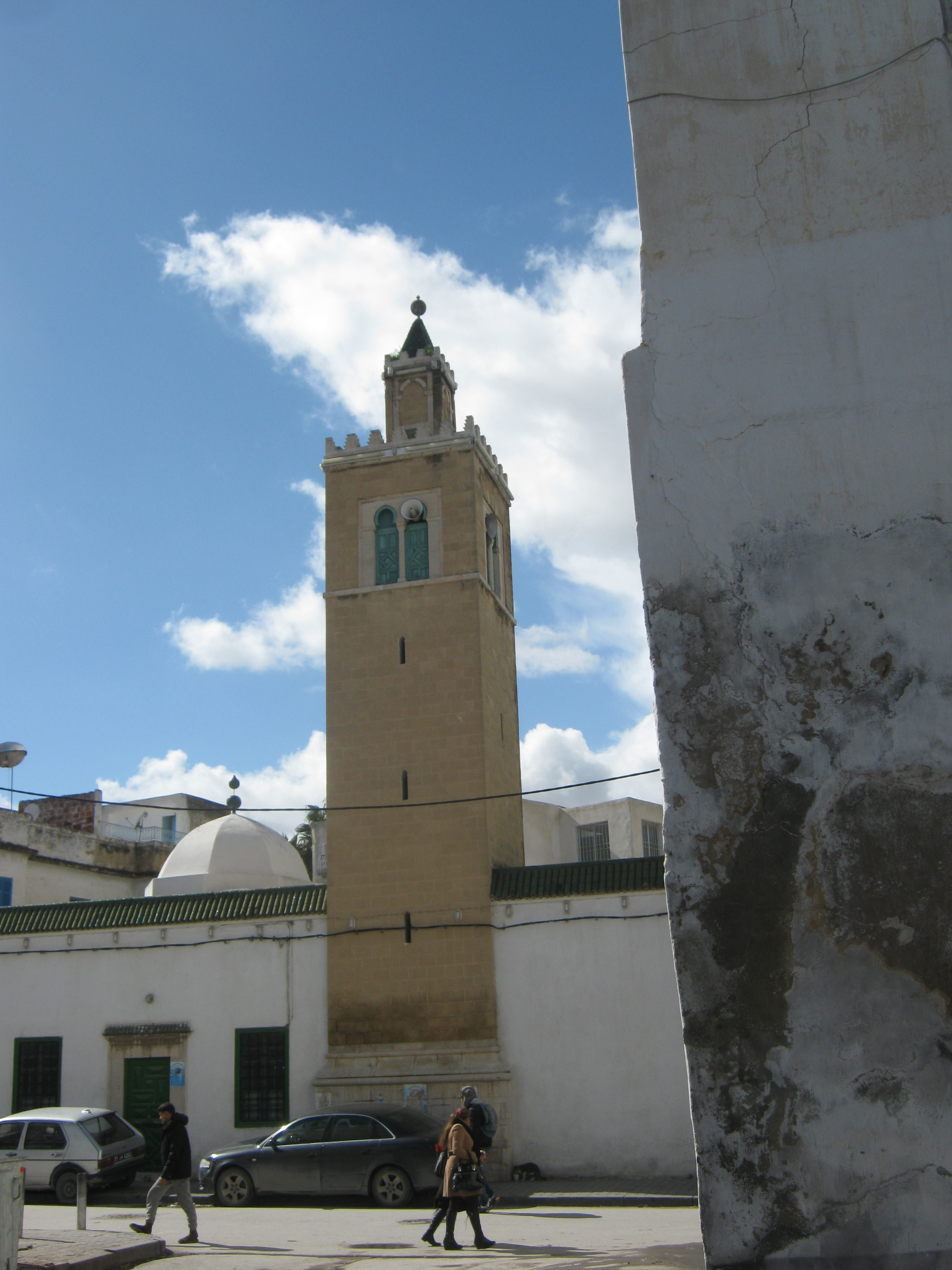 Minaret de la mosquée Beb el akwass